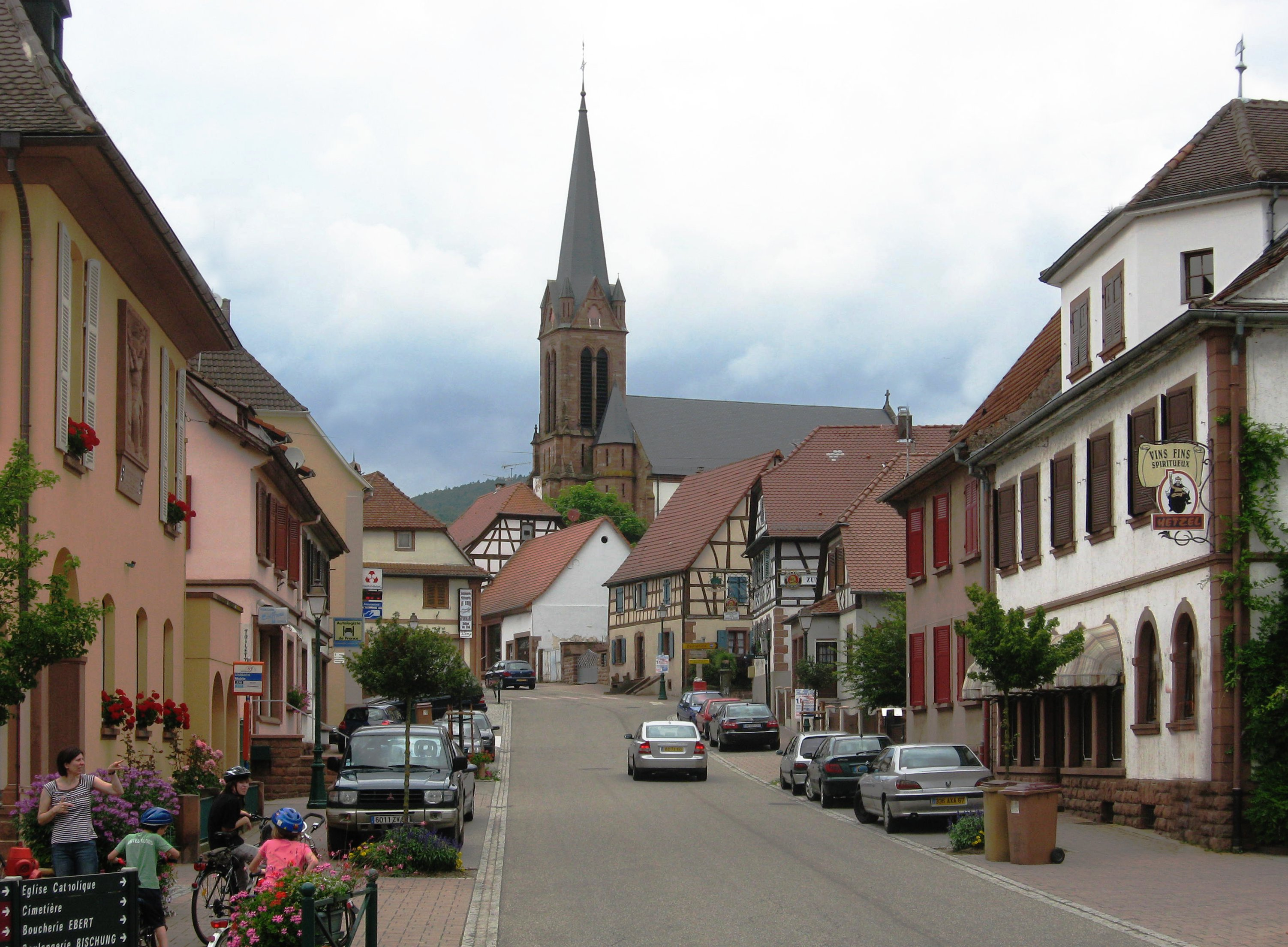 Hauptstraße in Lembach